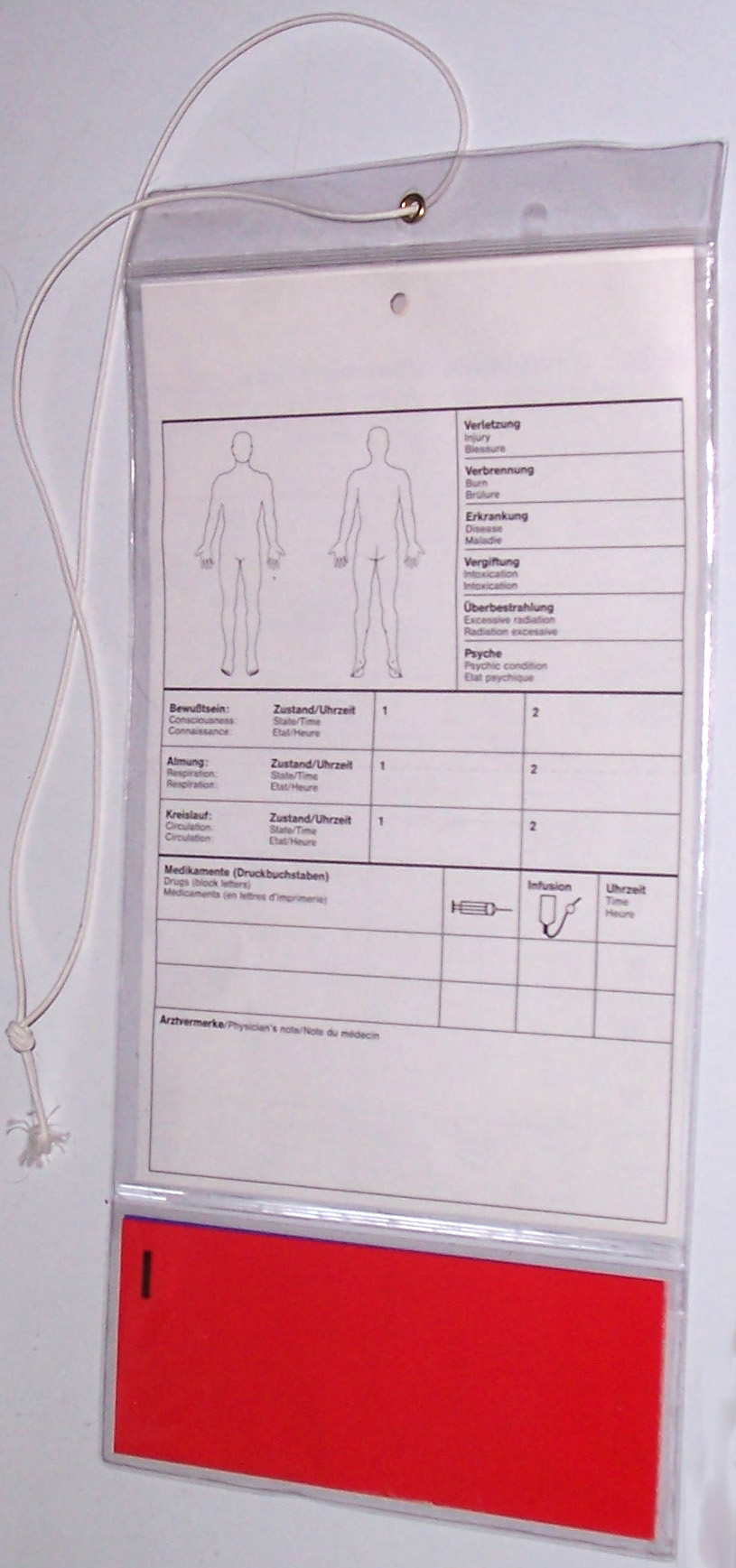 Eine Verletztenanhängekarte des DRK. Vorderseite Fotograf oder Zeichner: Sven Tombers Datum: 2.9.2005